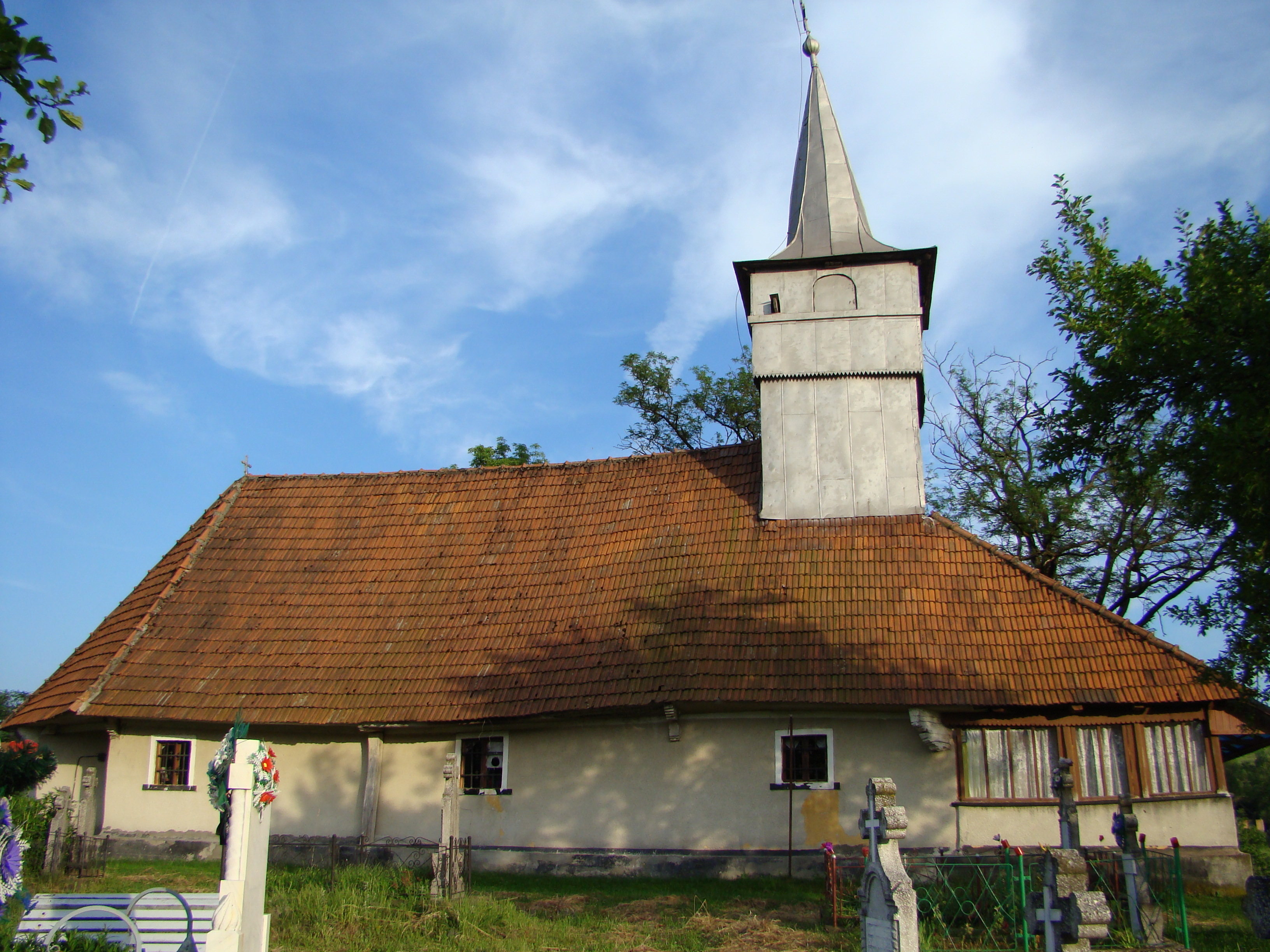 Biserica de lemn din Sulighete